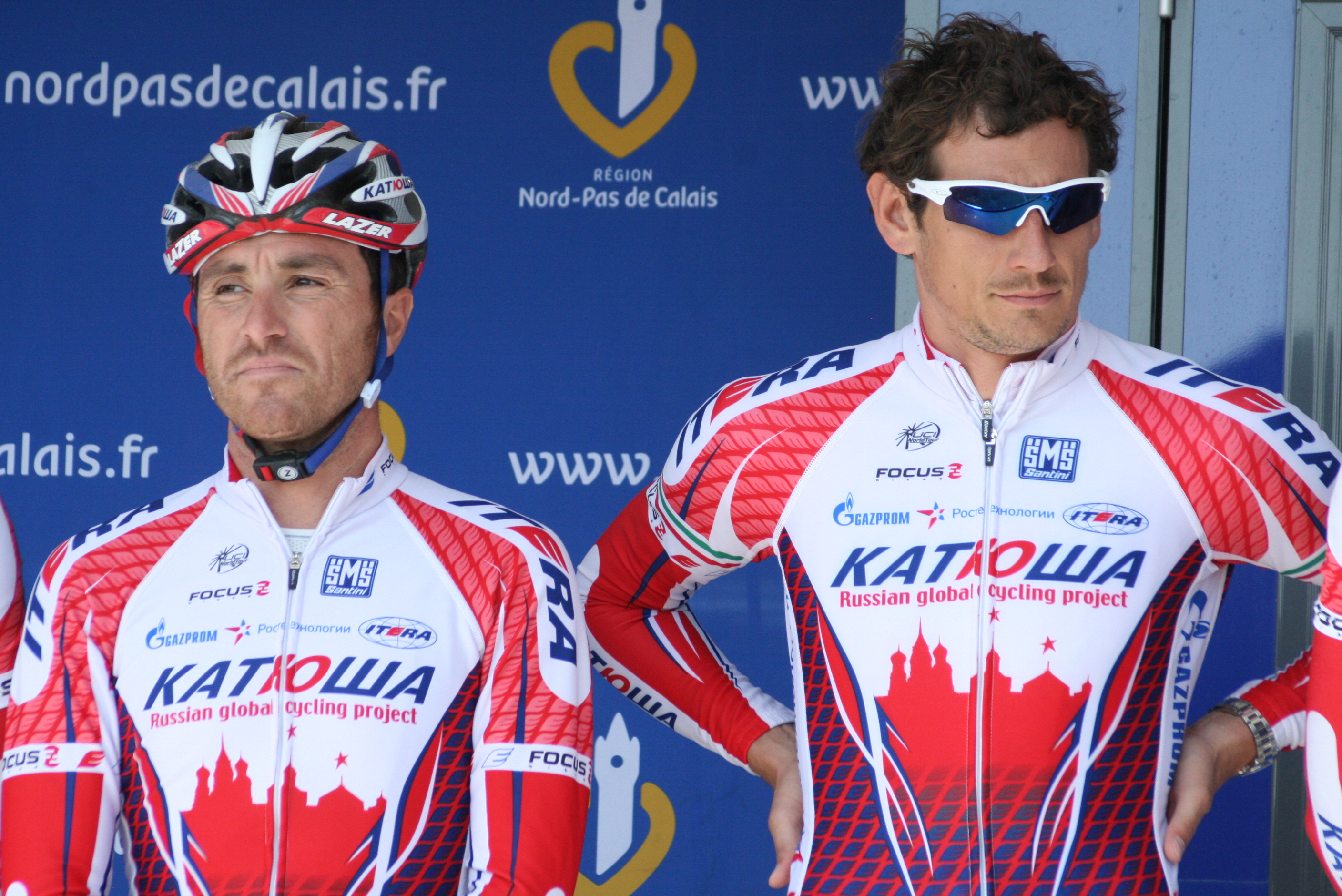 Présentation des coureurs au départ de la première étape des Quatre jours de Dunkerque 2011 Luca Paolini, Filippo Pozzato